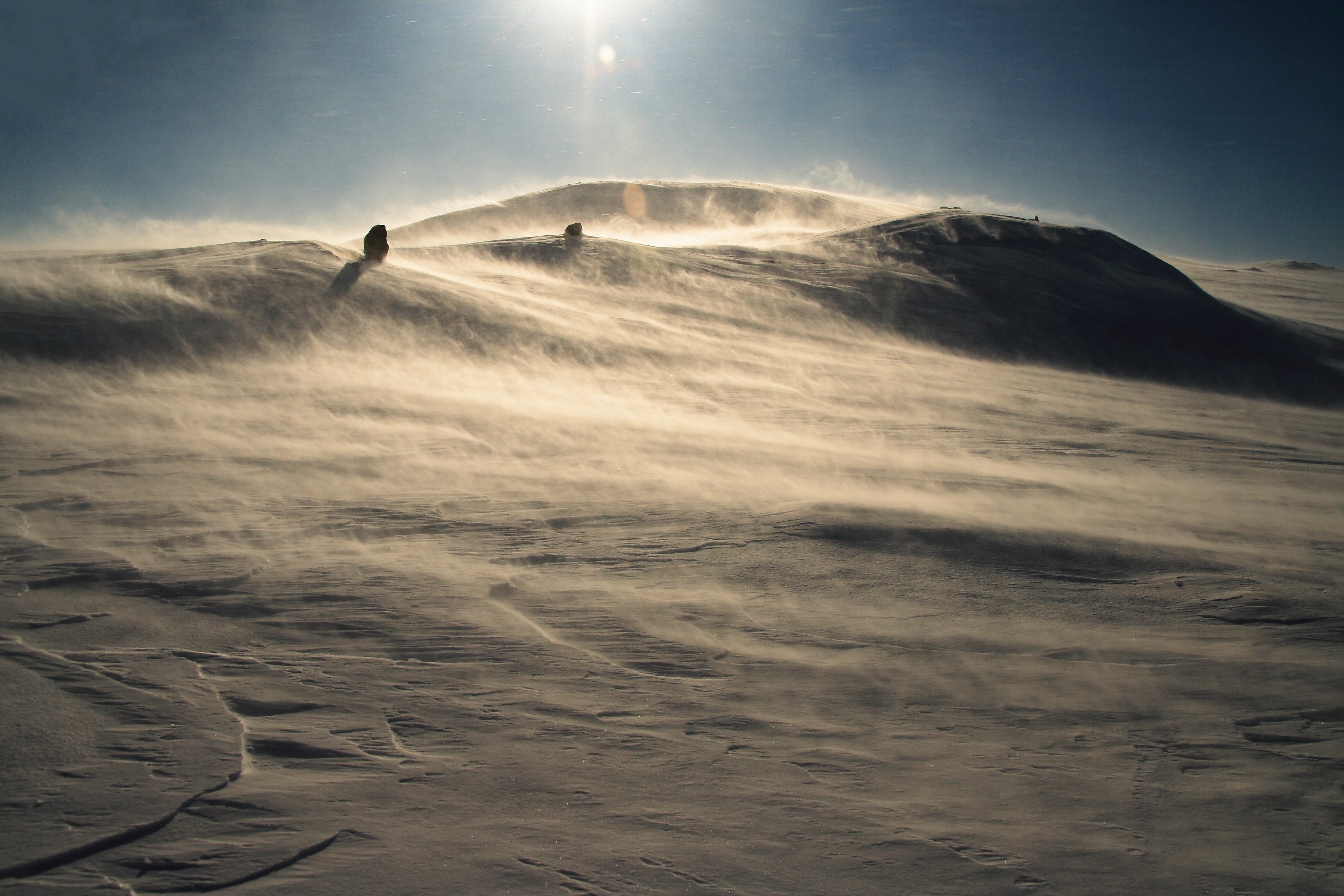 Niska zamieć na płaskowyżu Hardangervidda.